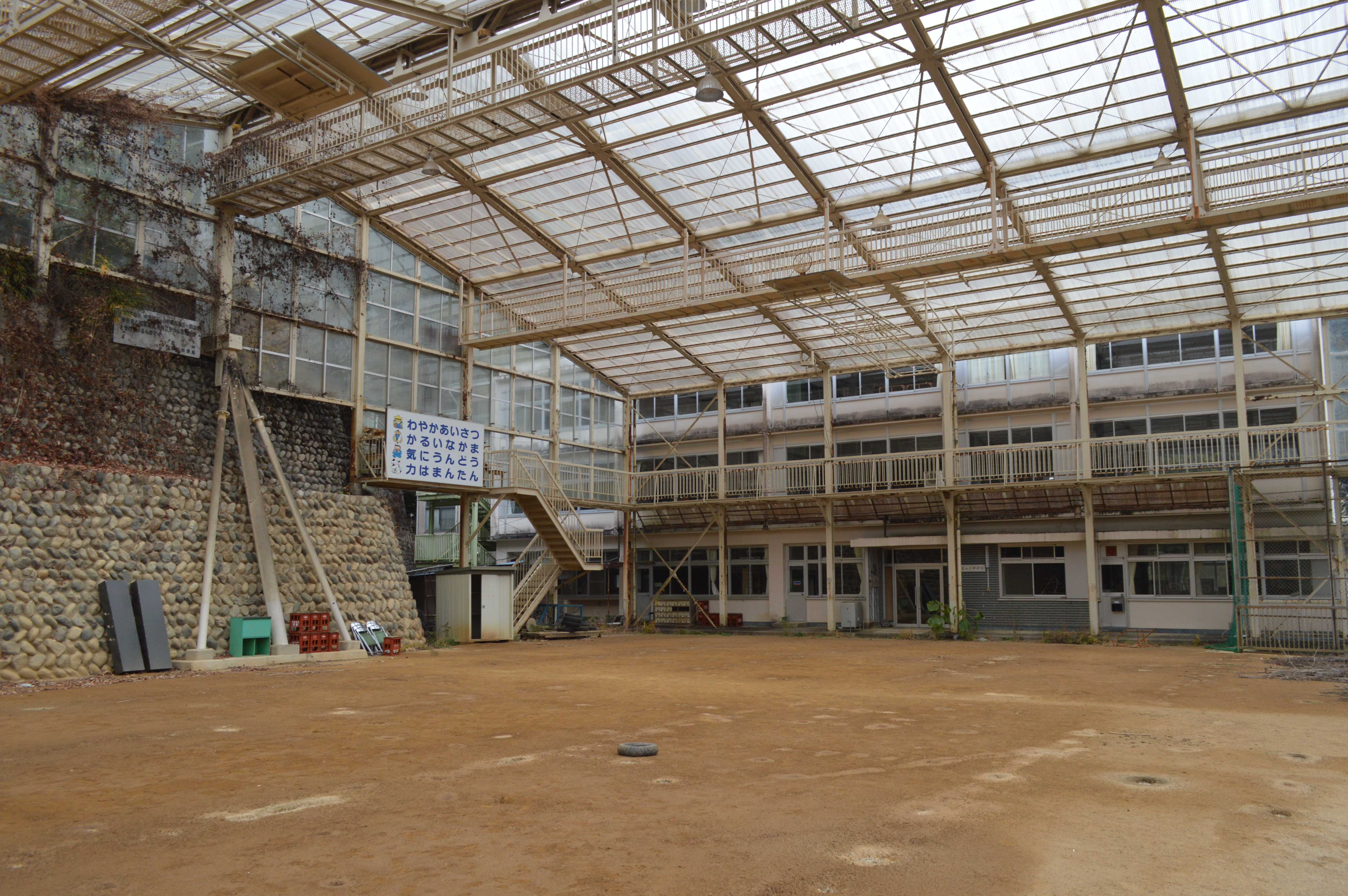 愛知県北設楽郡豊根村富山にあった豊根村立富山小中学校。2015年廃校。